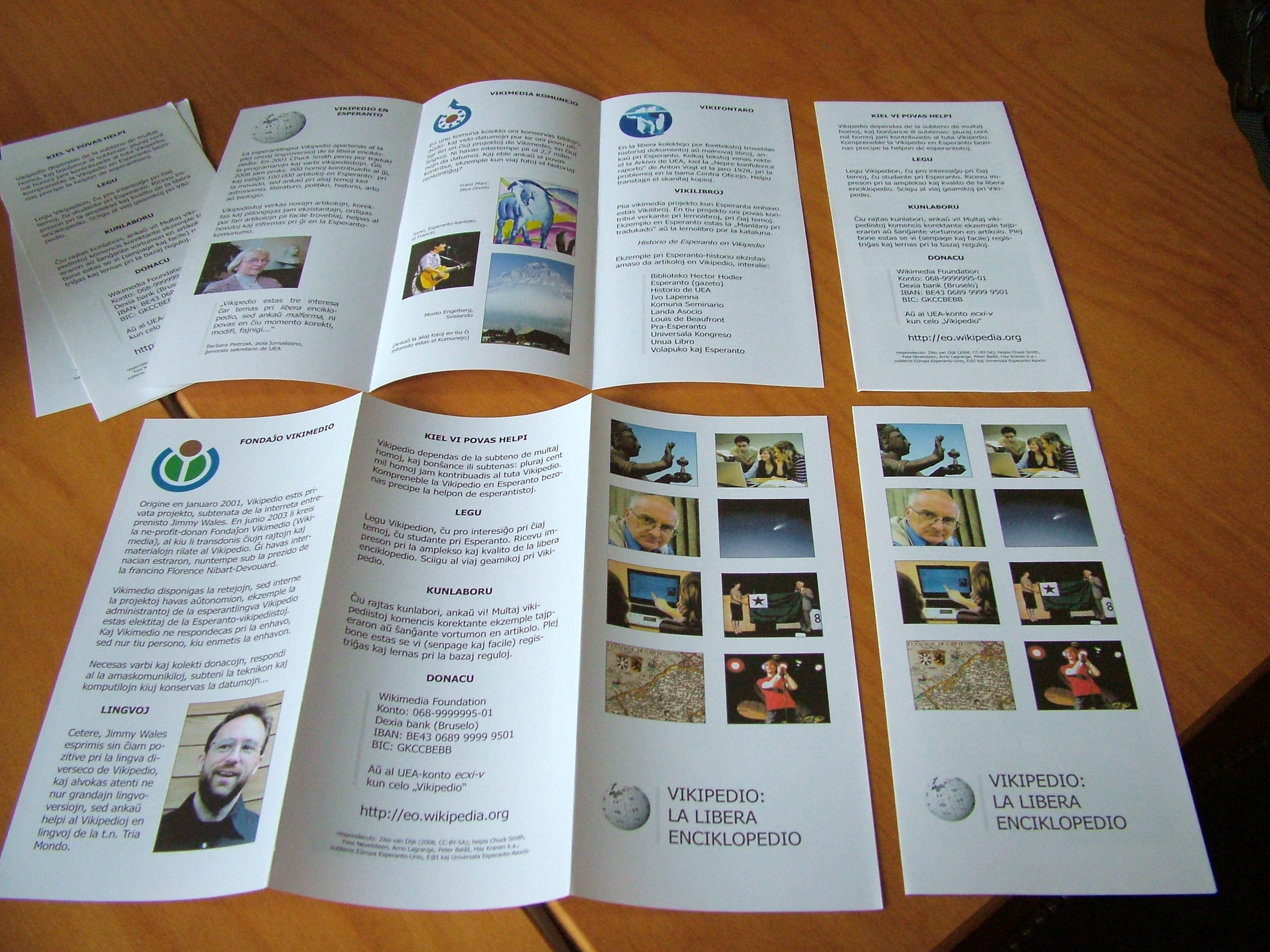 Vikipedio-informilo 2008, liverita posxte el Pollando al CO Roterdamo. Dateno: .